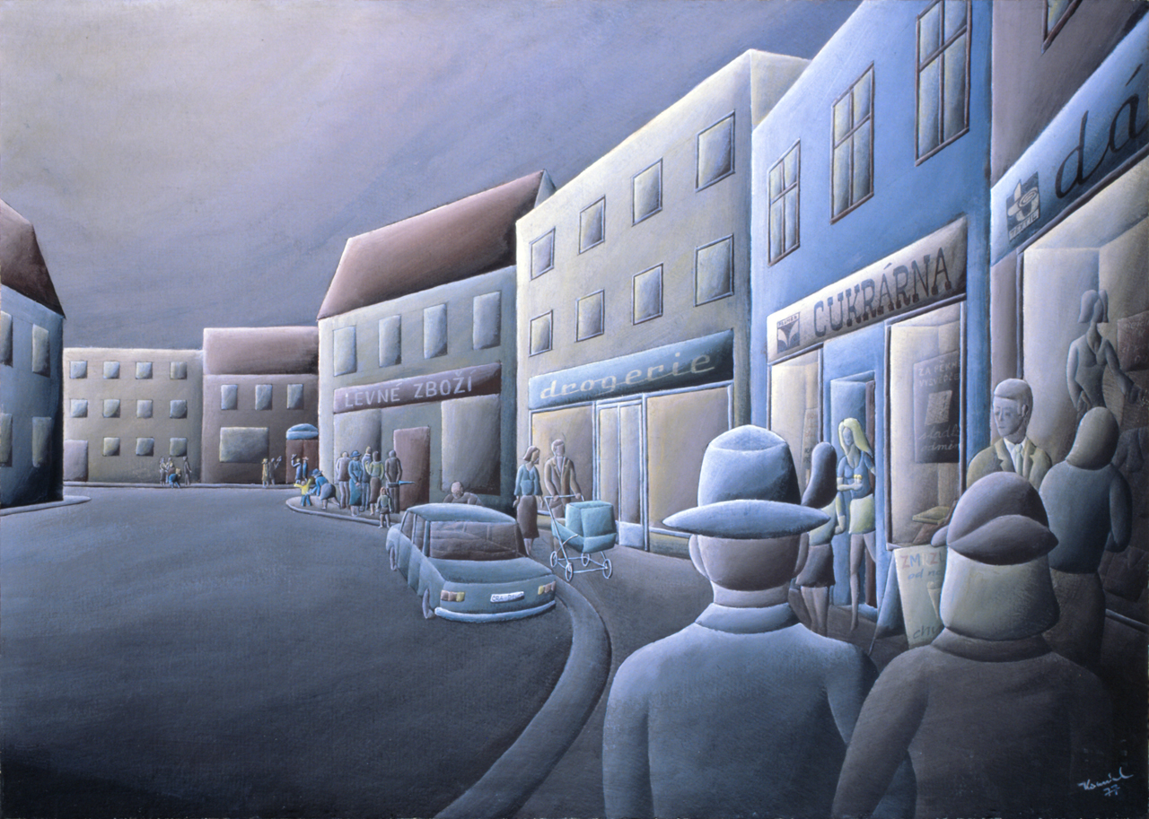 17. Bohumír Komínek, Nedělní odpoledne (1977)